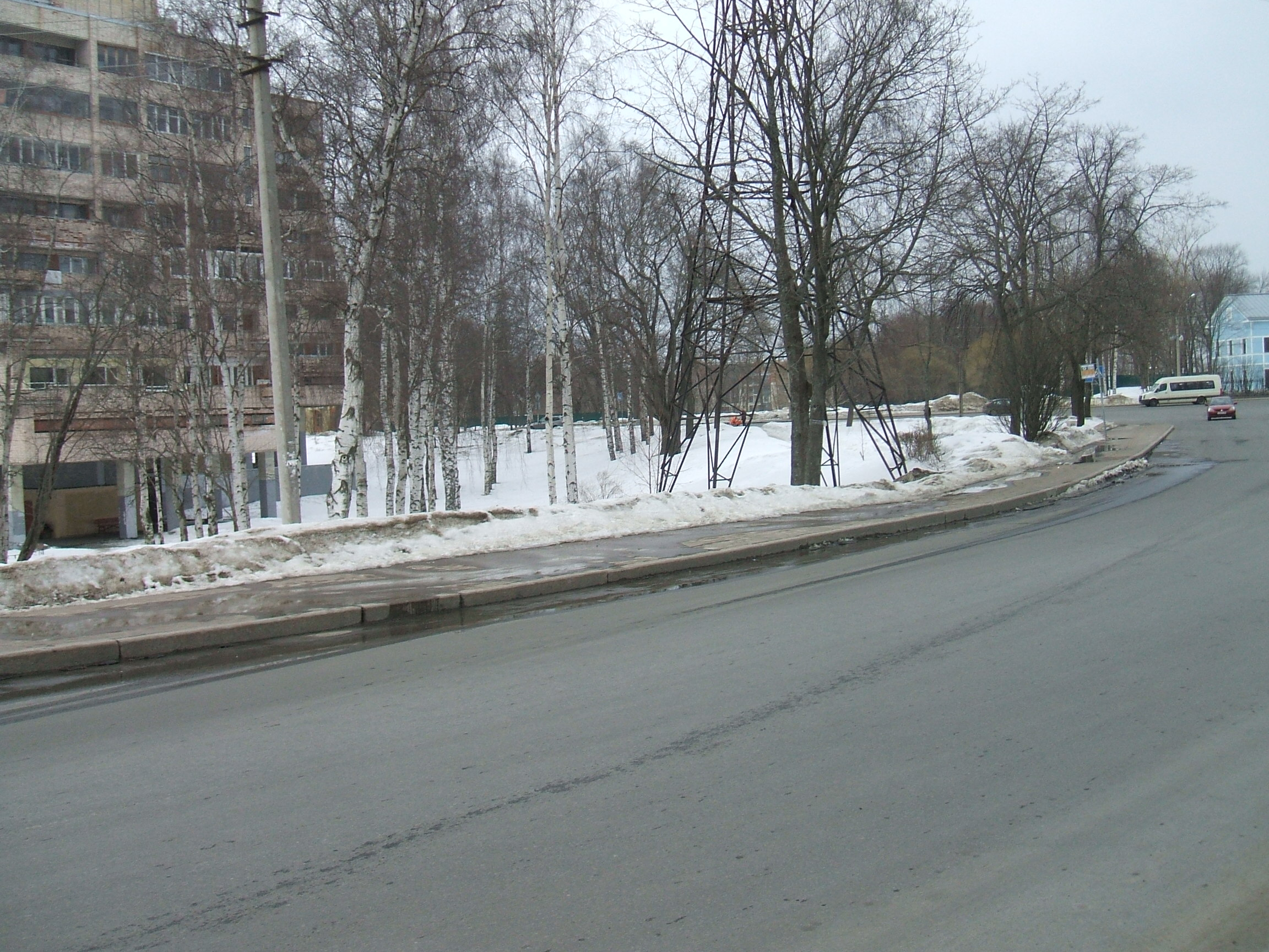 Сестрорецк СПб. ул.Мосина. Место прорыва дамбы водохранилища в 1807 году